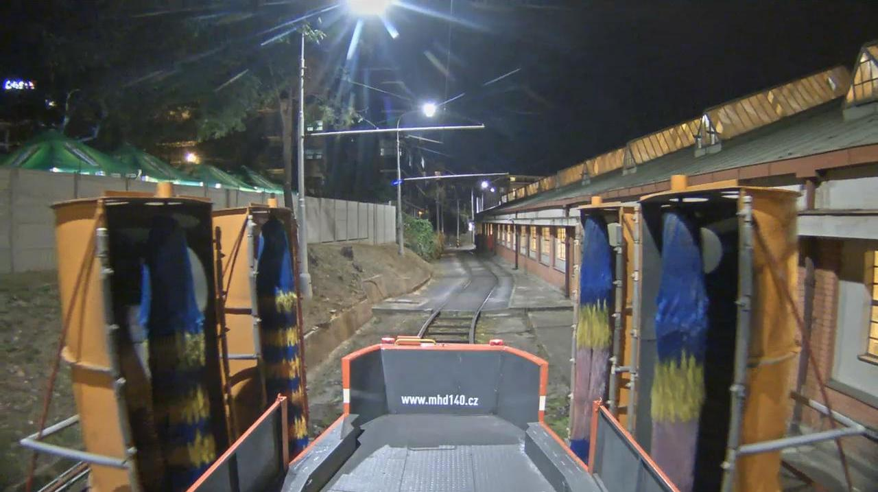 Mazačka v myčce